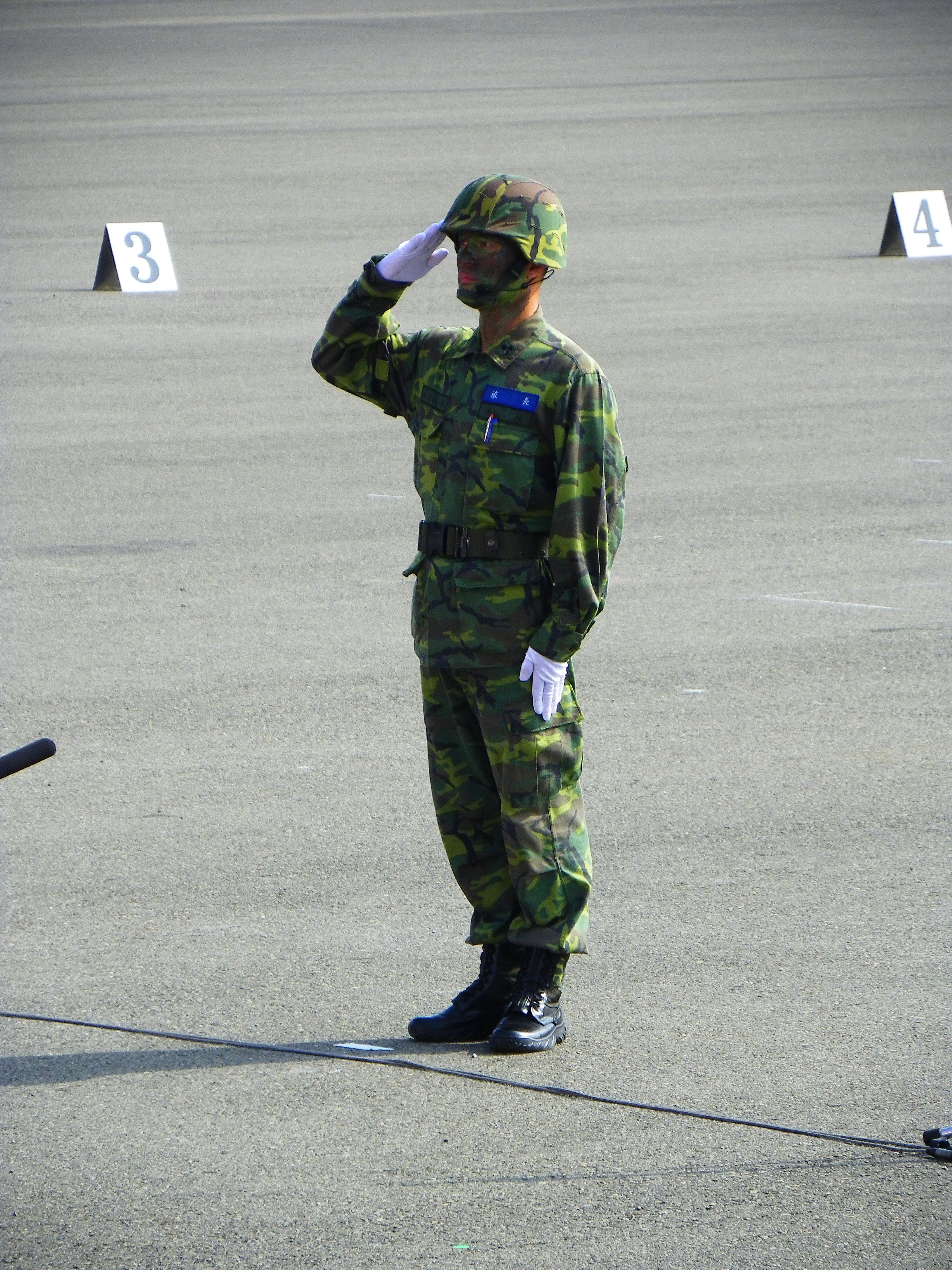 陸軍步兵302旅旅長林得春上校於開幕式向主校官第十軍團指揮官羅際琴中將報告，參加民國102年度成功嶺營區開放活動人員裝備數量，聲震全場。